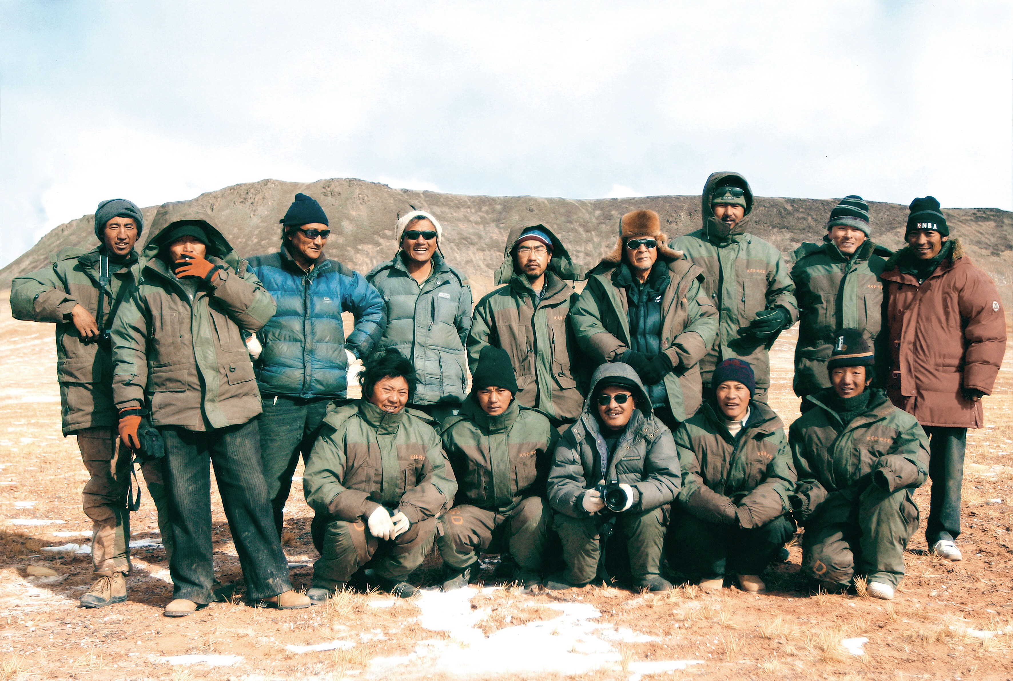 뒷줄 오른쪽에서 4번째가 박철암 대장